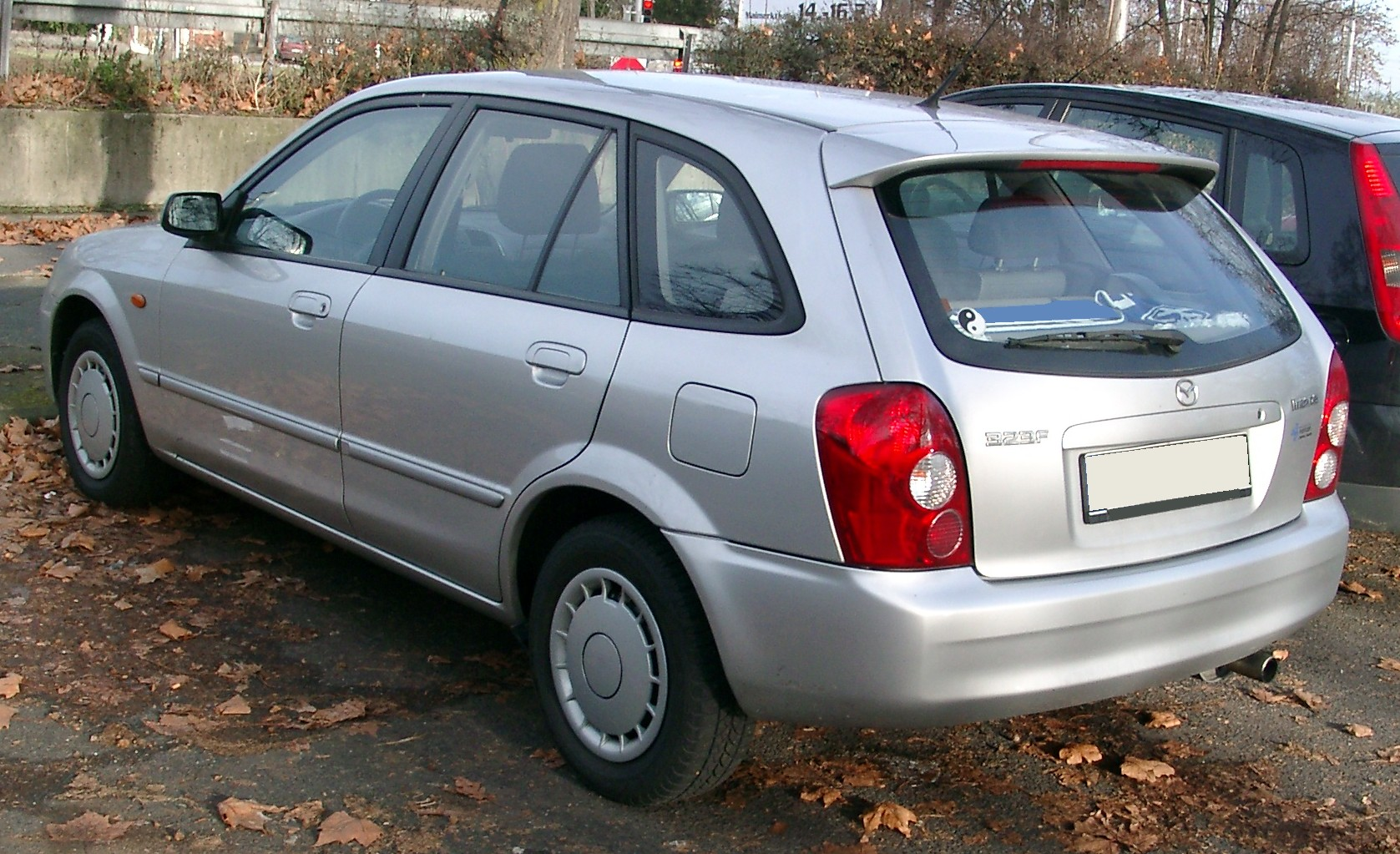 Mazda 323f